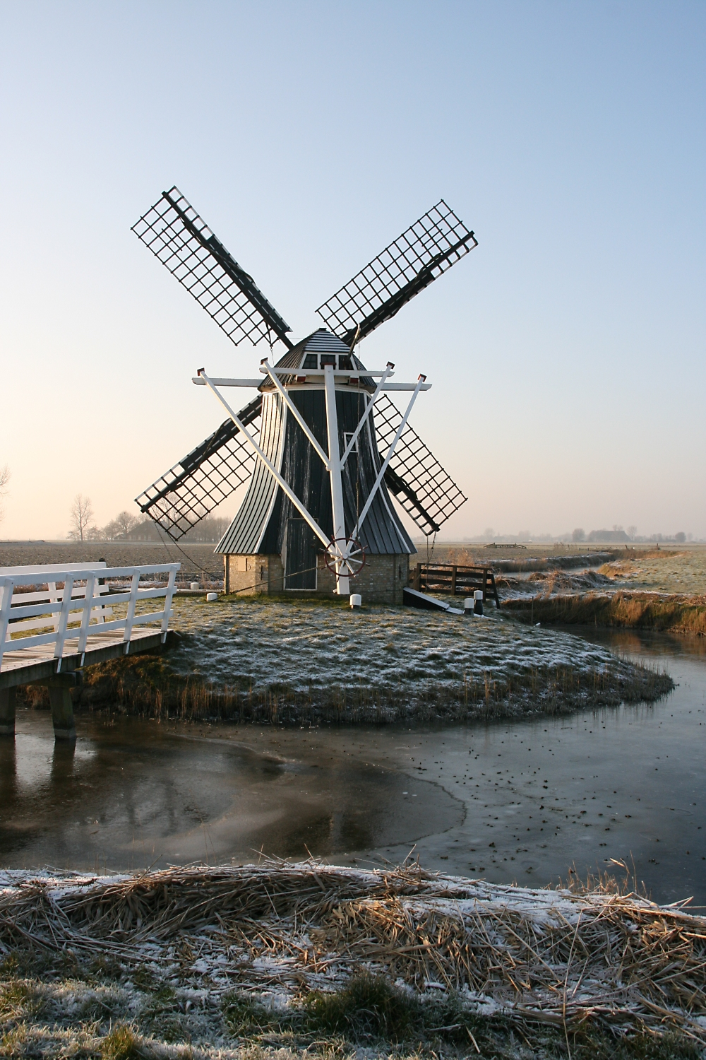 Dronrijp: Hatsumermolen bij vorst